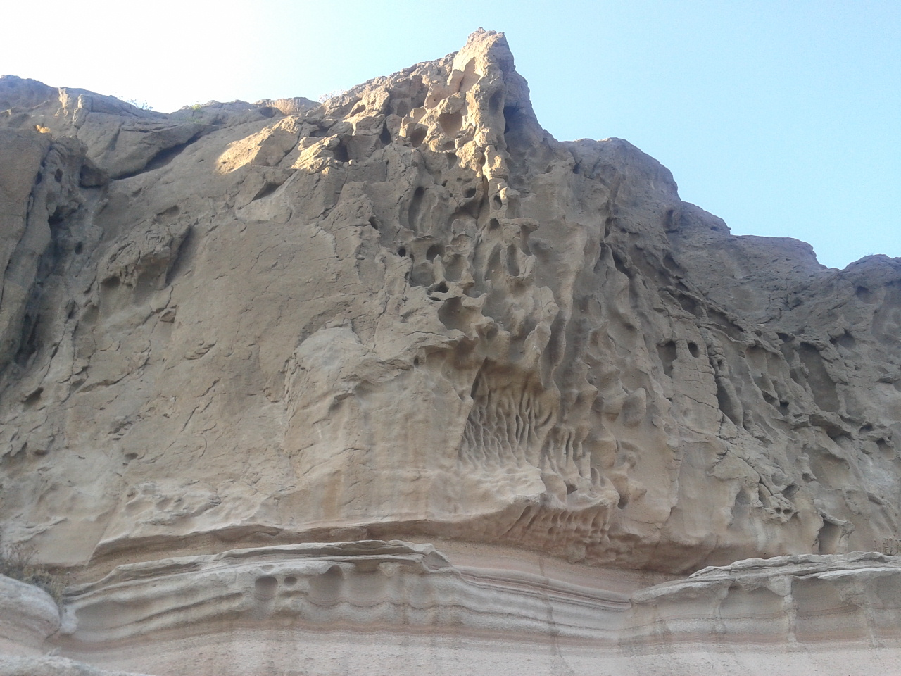 Badavut kayalıklar